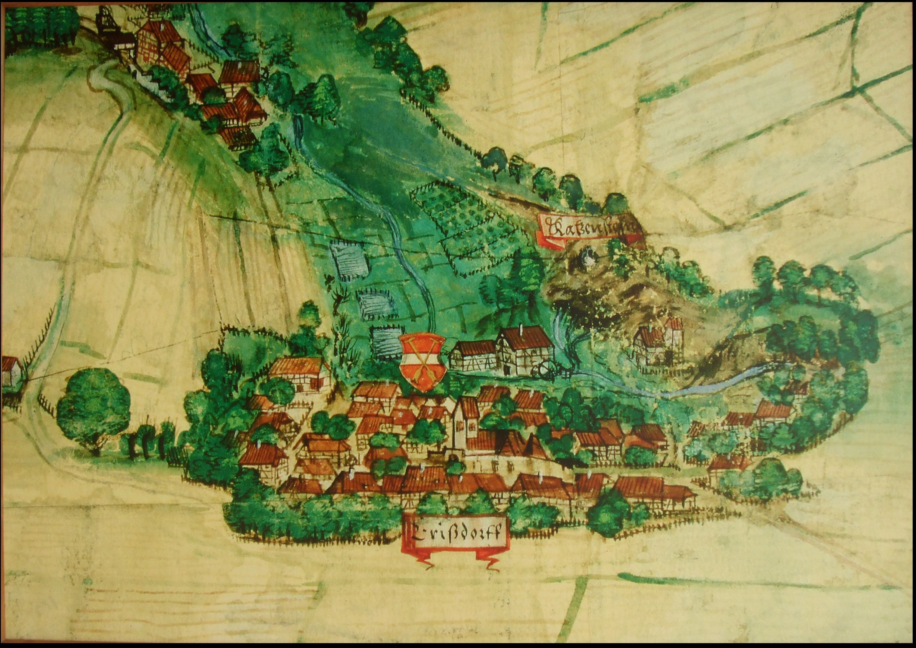 Ortsbild von Erisdorf 1589 in der Gemeinde Ertingen-Erisdorf, Deutschland, eigenhändig fotografiert von Martin Gabel